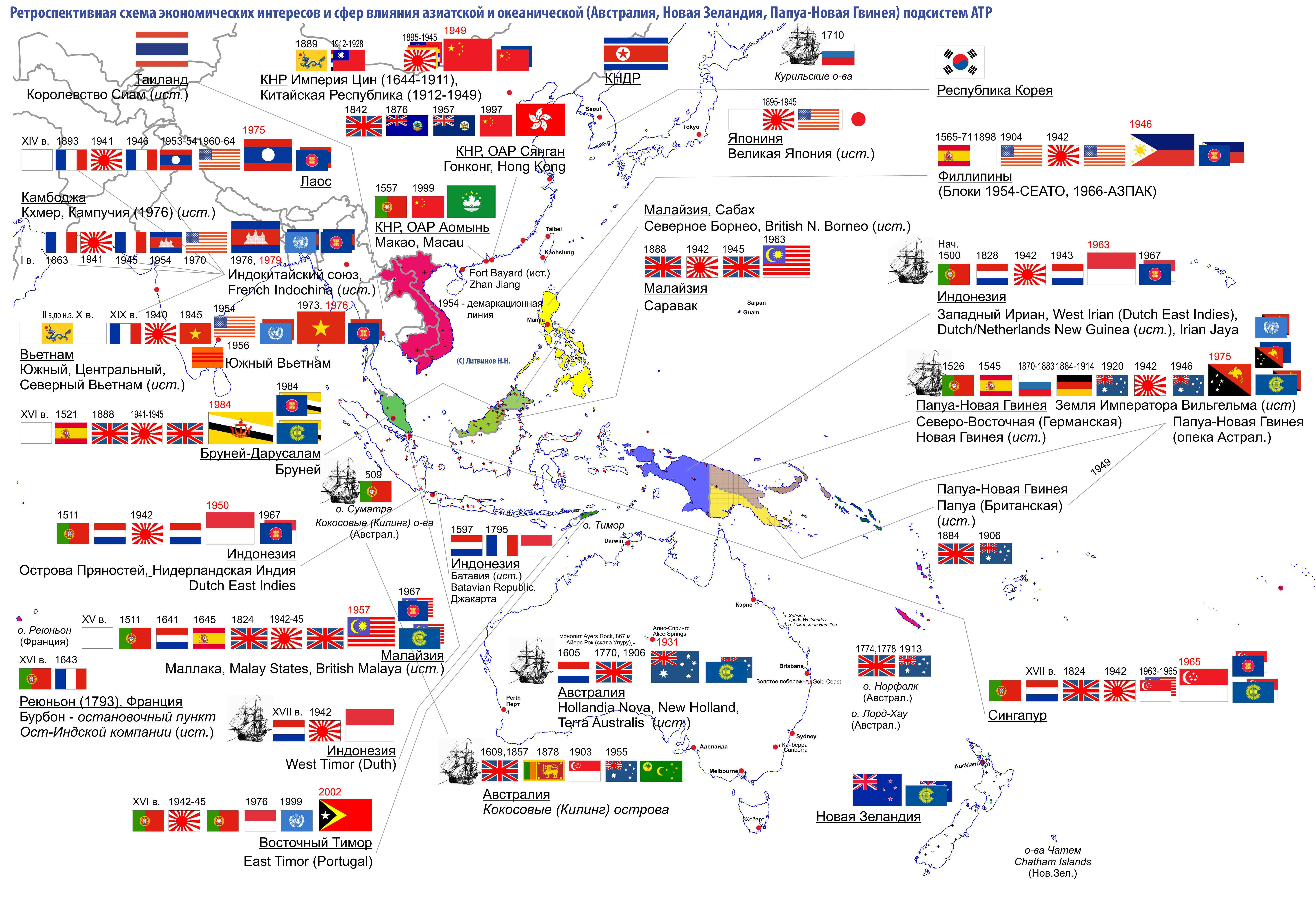 Ретроспективная схема экономических интересов и сфер влияния азиатской и океанической (Австралия, Новая Зеландия, Папуа-Новая Гвинея) подсистем АТР. (для статьи Юго-Восточная Азия). Источник: Литвинов Н.Н. Стратегический менеджмент на примере Азиатско-Тихоокеанского региона. Монография. — М., 2010. — 200 [10] с. — (Strategic Management in the Asian-Pacific) - ISBN 978-5-91252-029-7